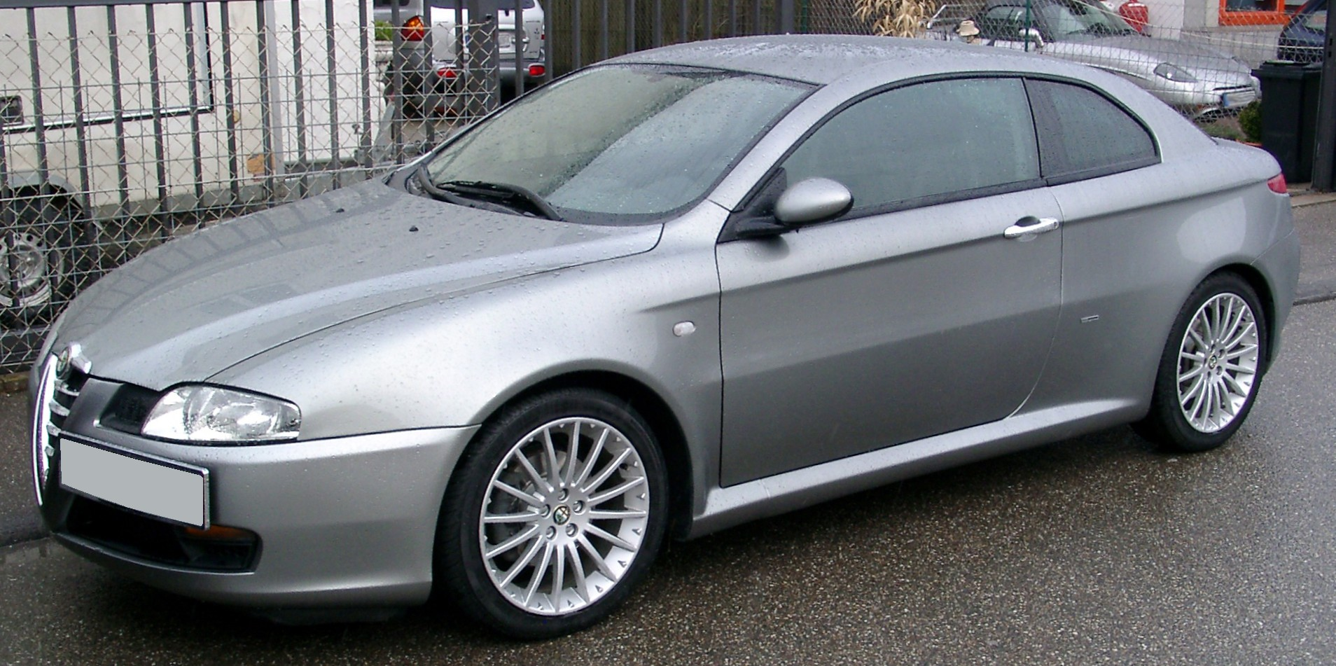 Alfa Romeo GT